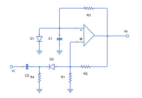 Monostabile